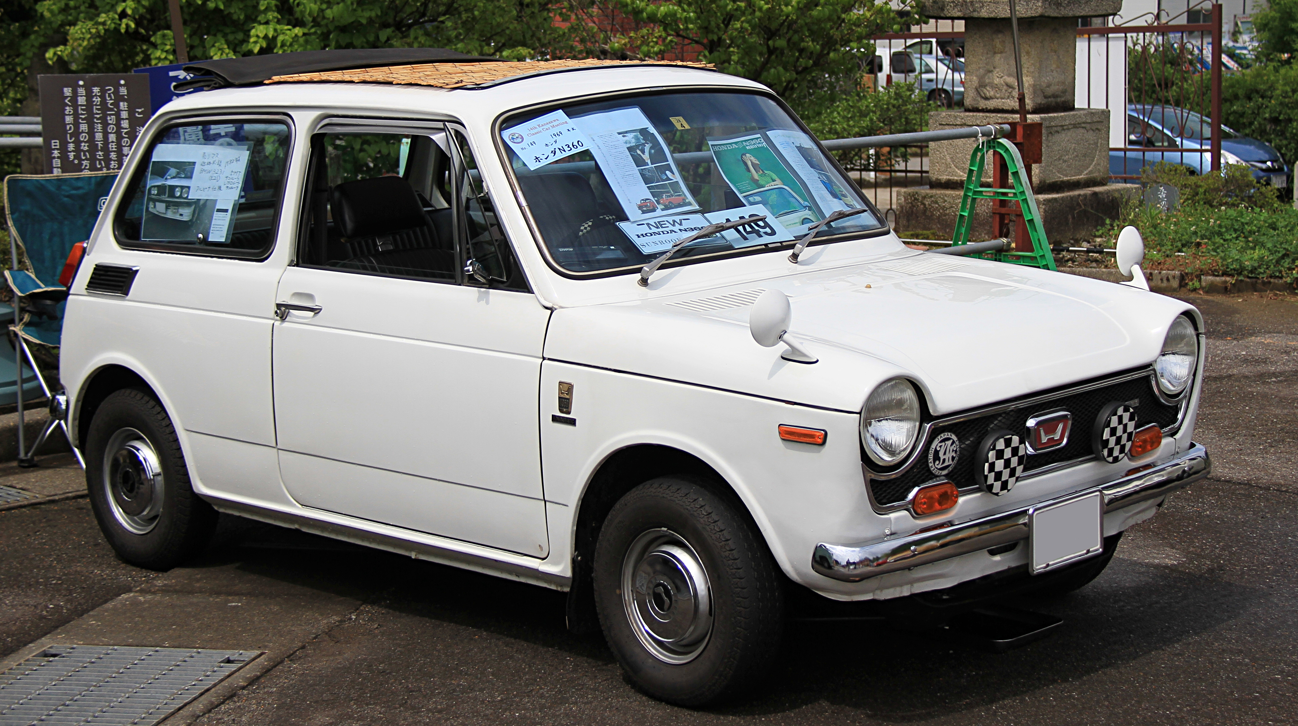 Honda N360